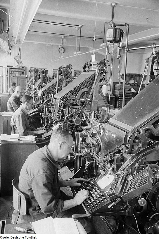 Original image description from the Deutsche Fotothek Mitarbeiter der Druckerei Offizin Haag-Drugulin in Leipzig